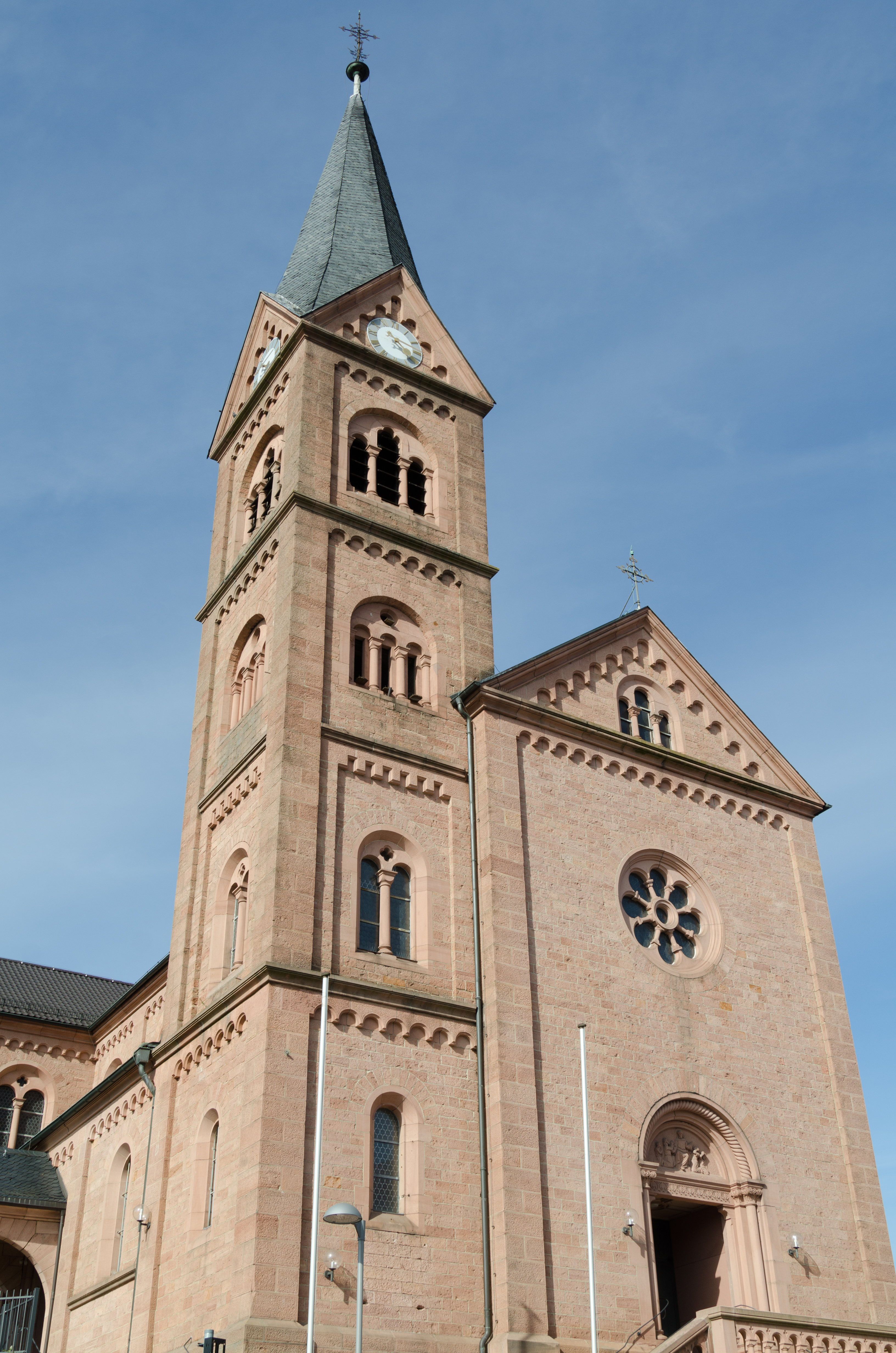 Goldbach, St. Nikolaus